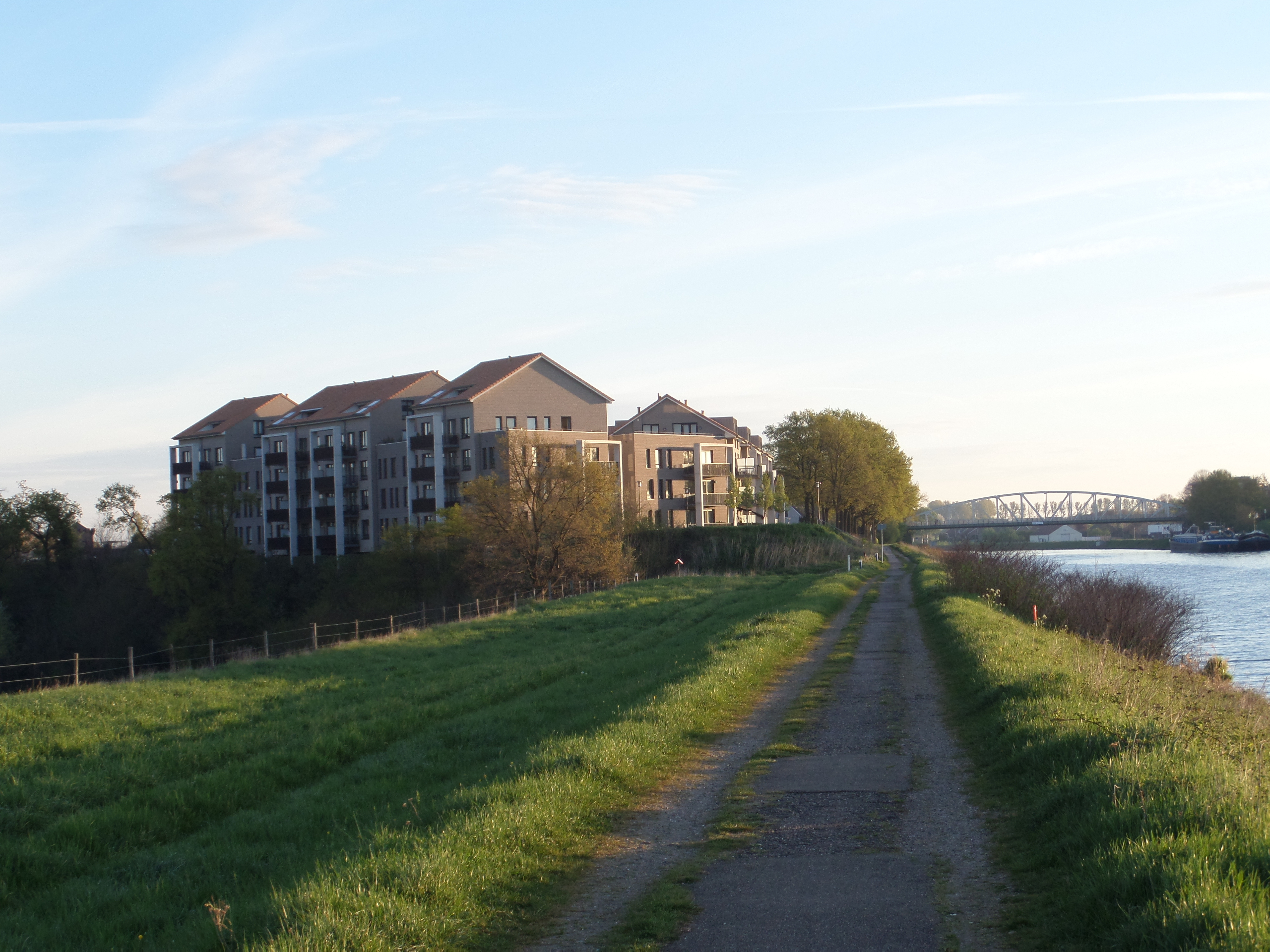 Jaagpad langs het Julianakanaal bij Urmond (gemeente Stein) in de Nederlandse provincie Limburg met op de achtergrond het appartementengebouw MuntherVeste